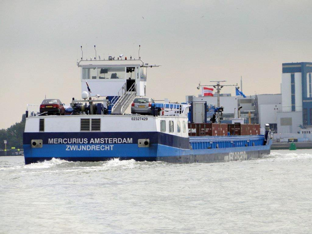 Port-Feederbarge Mercurius Amsterdam